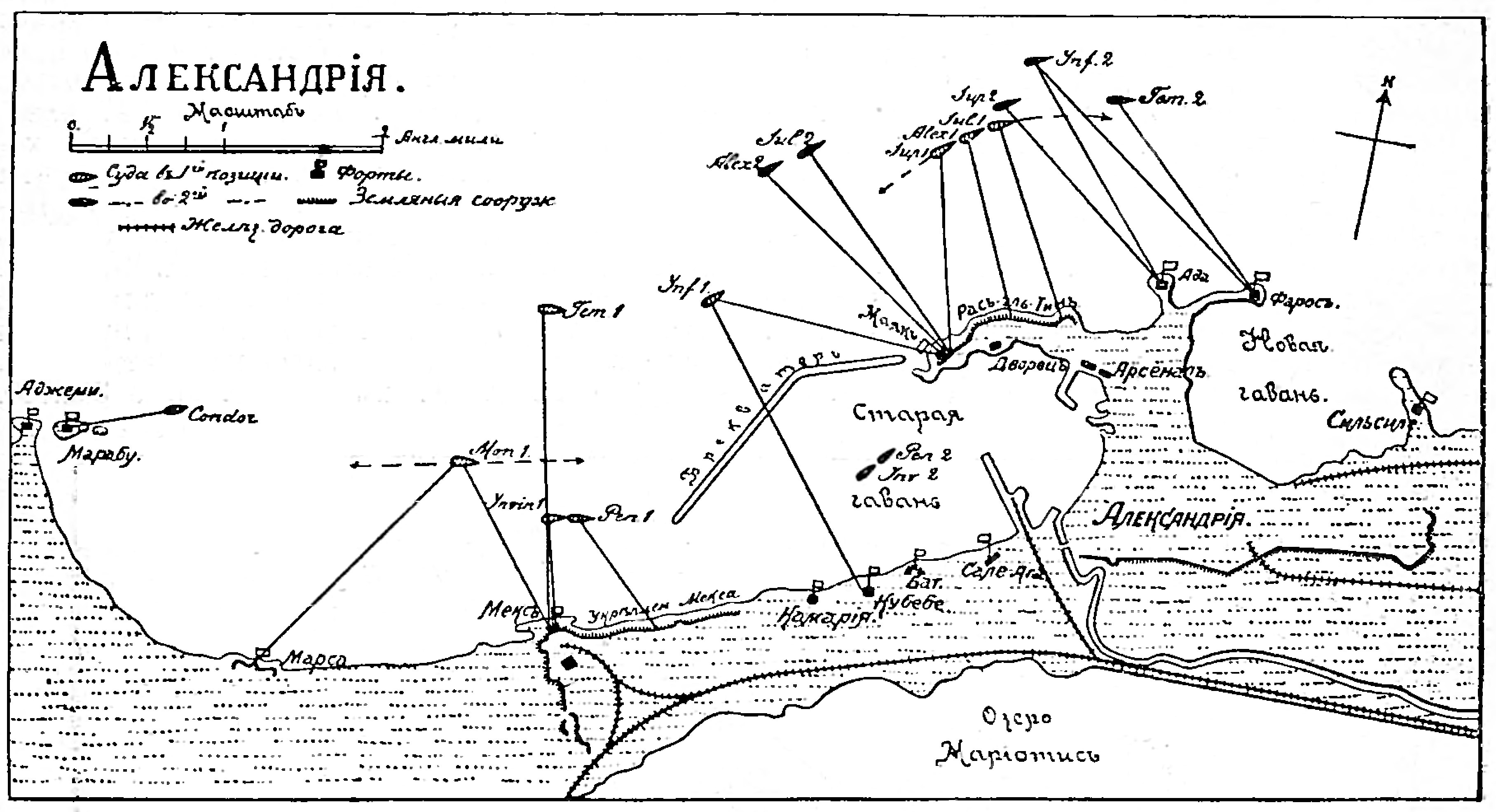 Изображение из «Военной энциклопедии» изданной книгоиздательским товариществом Ивана Дмитриевича Сытина. Санкт-Петербург; 1911—1915 гг. Фото к статье «Александрия».